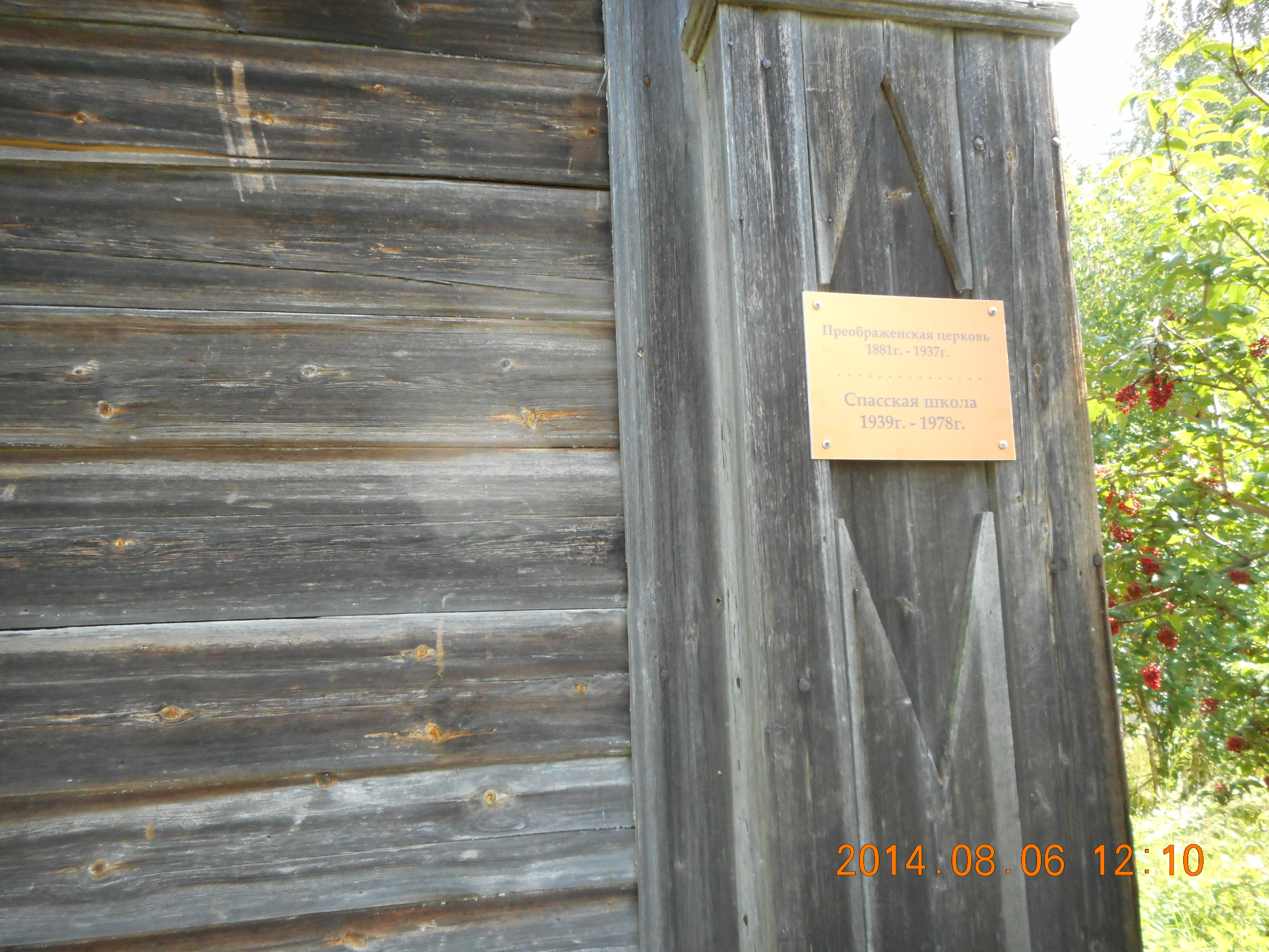 Памятная доска была установлена бывшими учениками-земляками Спасской школы.